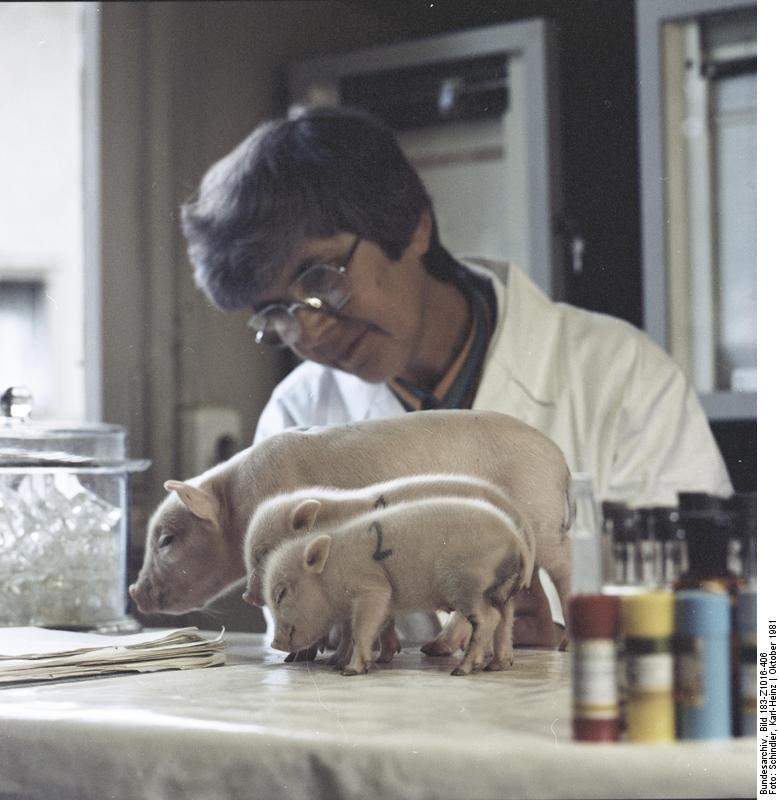 ADN-ZB/Schindler/16.10.81/Berlin: Keine Angst, ihr Schnitzel wird nicht kleiner! Diese "Forschungsschweine" haben schließlich eine andere Perspektive. Die Miniaturschweinrasse "MINILEWE" wurde vom Bereich Tierzüchtung und Haustiergenetik der Sektion Tierproduktion und Veterinärmedizin der Humbolt-Universität speziell für medizinisch-biologische Forschungszwecke gezüchtet. Die bedeutende Verringerung von Masse und Größe gegenüber den Hausrassen (etwa 1:4) wirkt sich bei Tierversuchen günstiger aus und ermöglicht eine wirtschaftlichere Haltung und Fütterung.